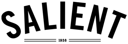 2013 logo of Salient magazine - since superseded